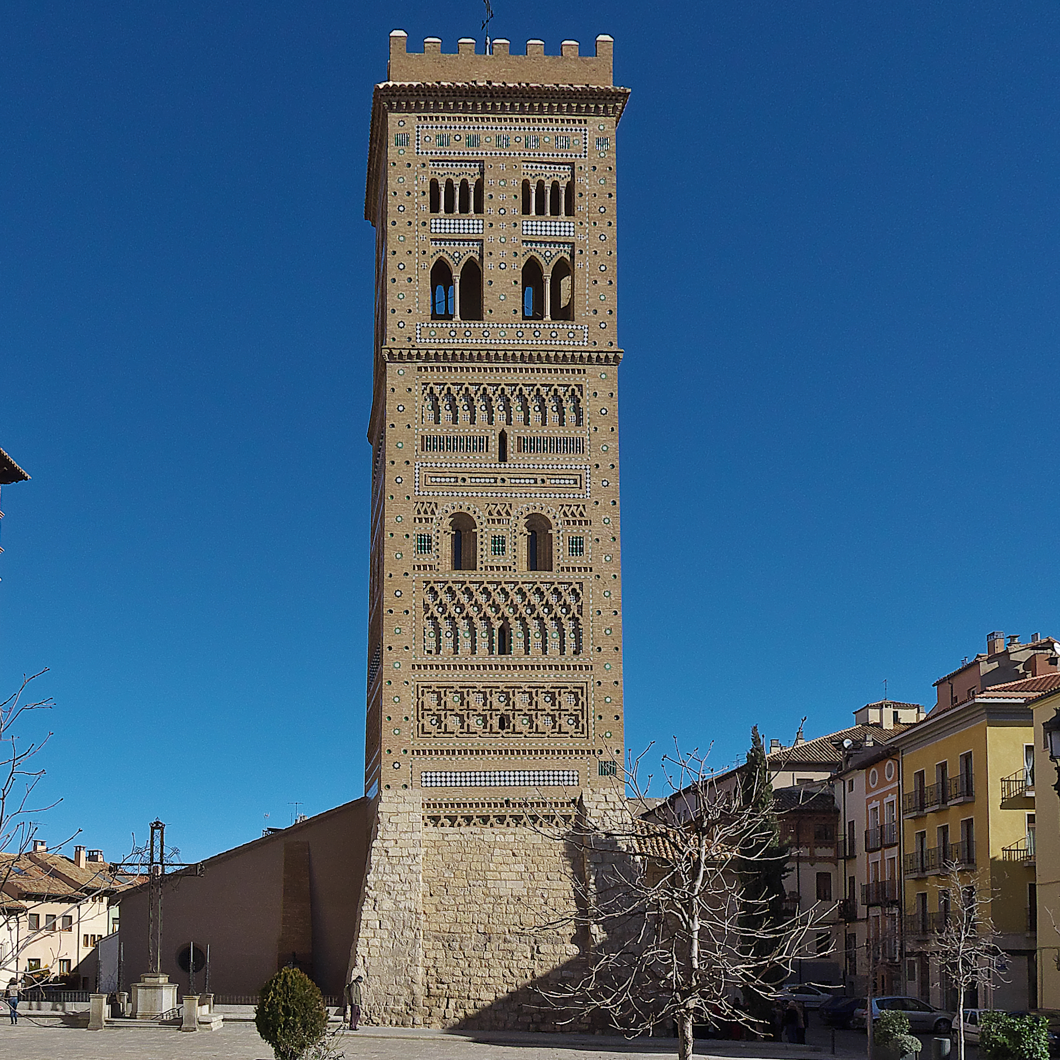 Los alminares almohades influyeron en la arquitectura mudéjar turolense.